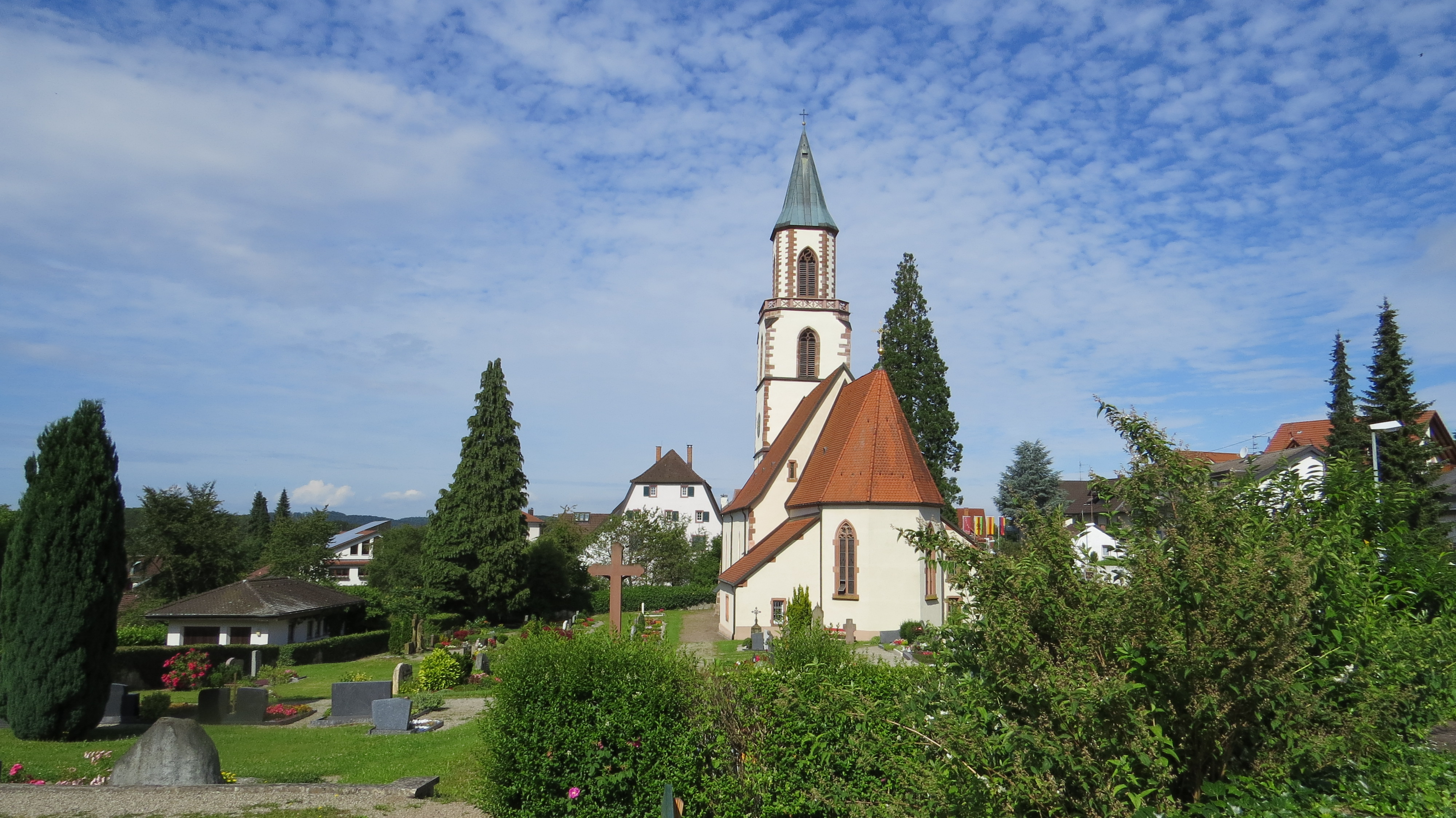 St. Gallus in Eichsel, Rheinfelden (Baden)